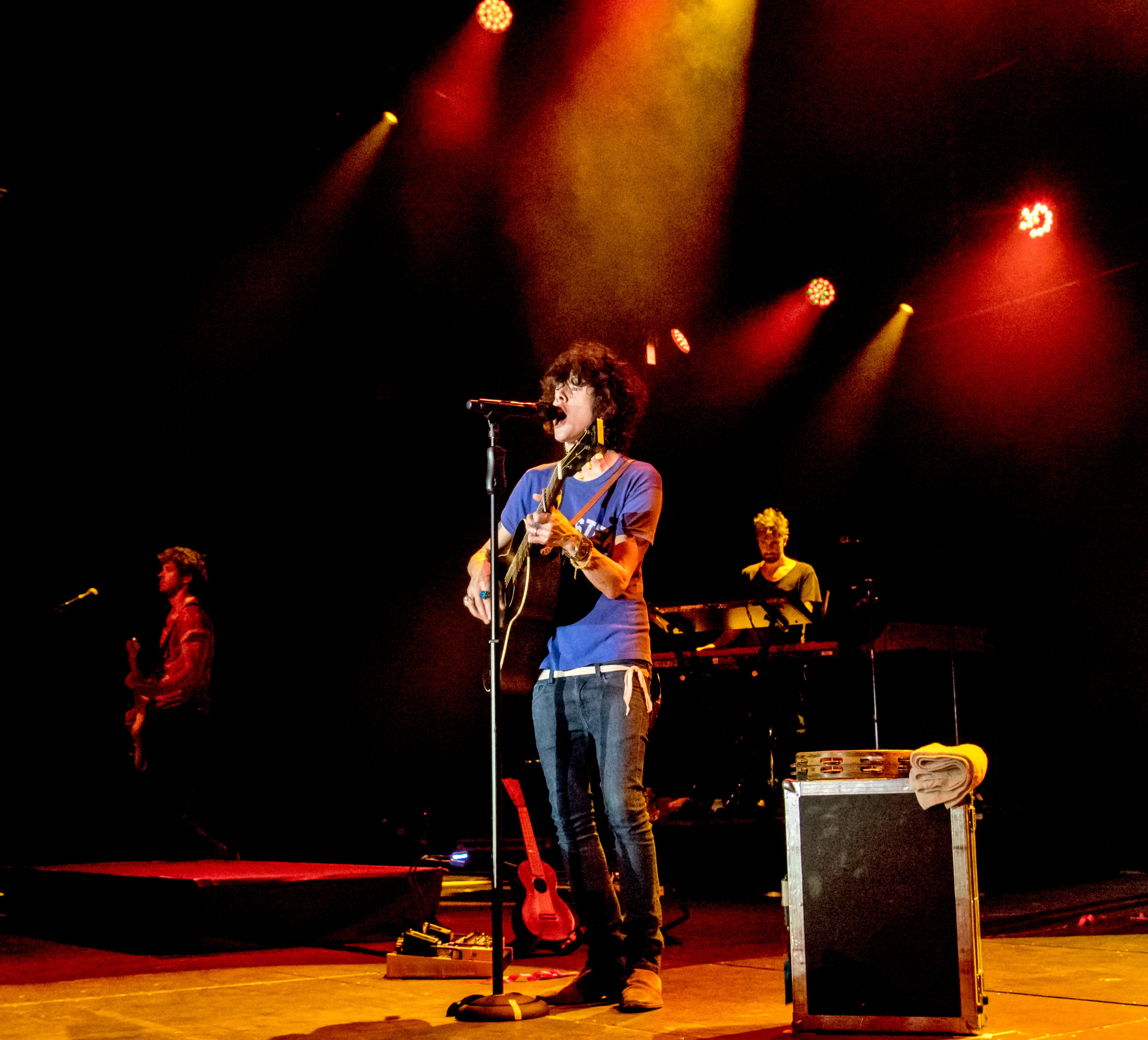 Bilder vom Zelt Musik Festival 2018 in Freiburg im Breisgau LP am 28.07.2018 im Zirkuszelt